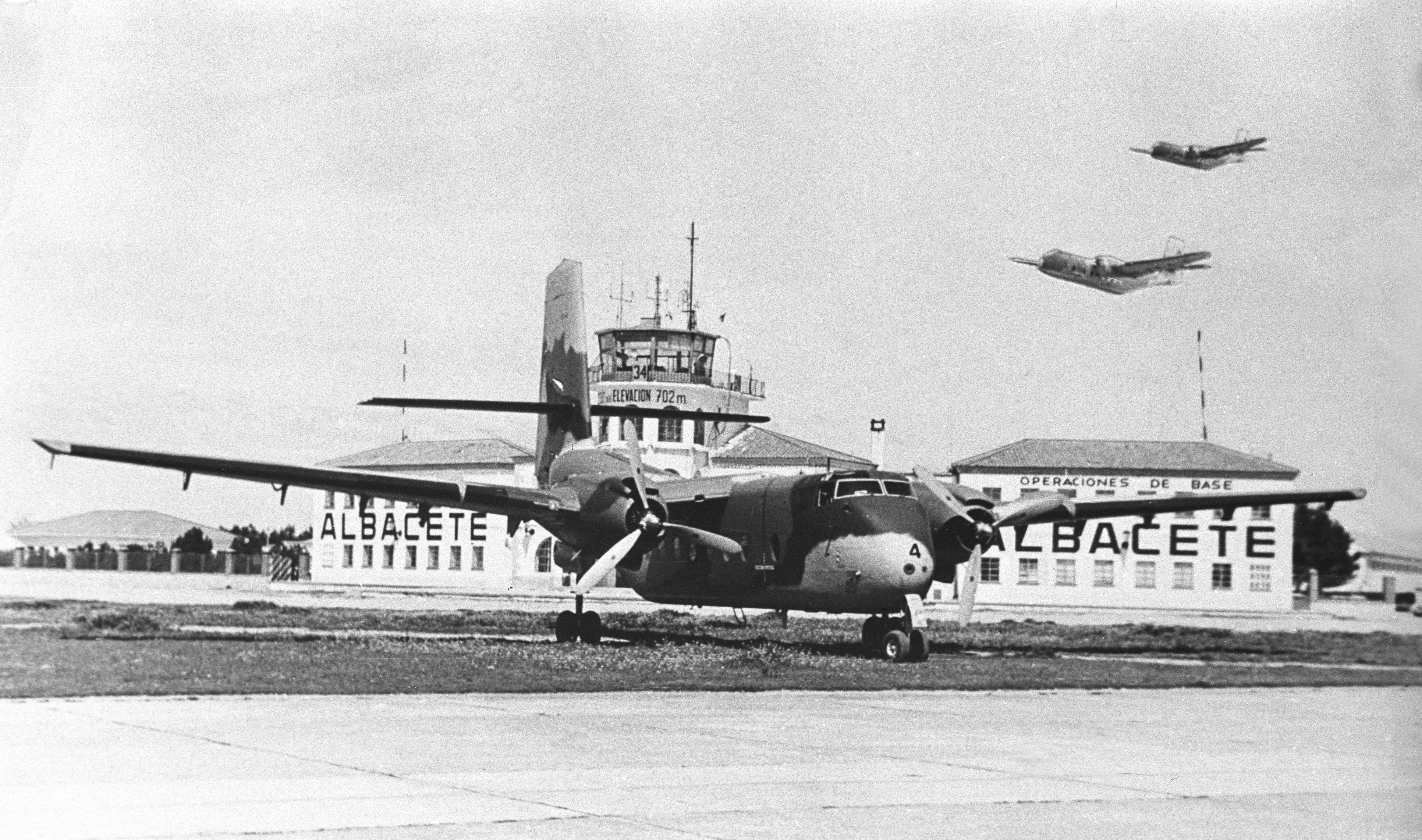 Caribou aparcado en la torre de mando, año 1965